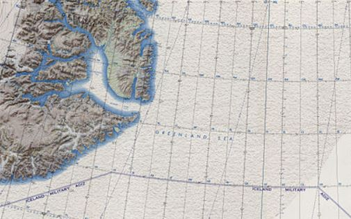 Carte maritime du sud-ouest de la mer du Groenland. Le fjord Scoresby Sund en haut à gauche de la carte.